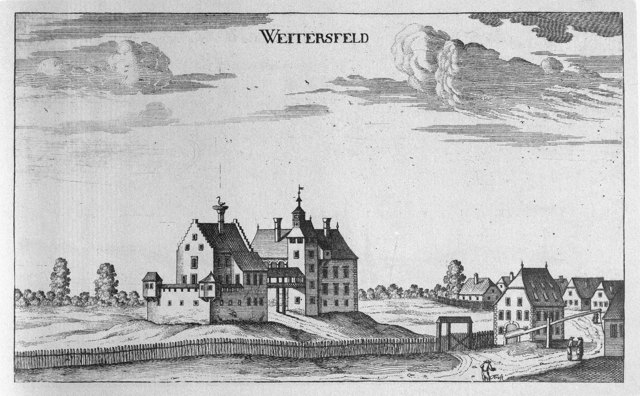 G. M. Vischers Käyserlichen Geographi, Topographia Ducatus Stiriae, Das ist: Eigentliche Delineation / und Abbildung aller Städte / Schlösser / Marcktfleck / Lustgärten / Probsteyen / Stiffter / Clöster und Kirchen / so es sich im Herzogthumb Steyrmarck befinden; Und anjetzo Umb einen billichen Preyß zu finden seynd Bey Johann Bitsch Universitäts Buchhandlern / Auff dem Juden=Platz bey der guldenen Saulen. Graz 1681 Die Nummerierung der Dateien folgt der alphabetischen Reihung der Ortsnamen und entspricht nicht dem Vischer-Register